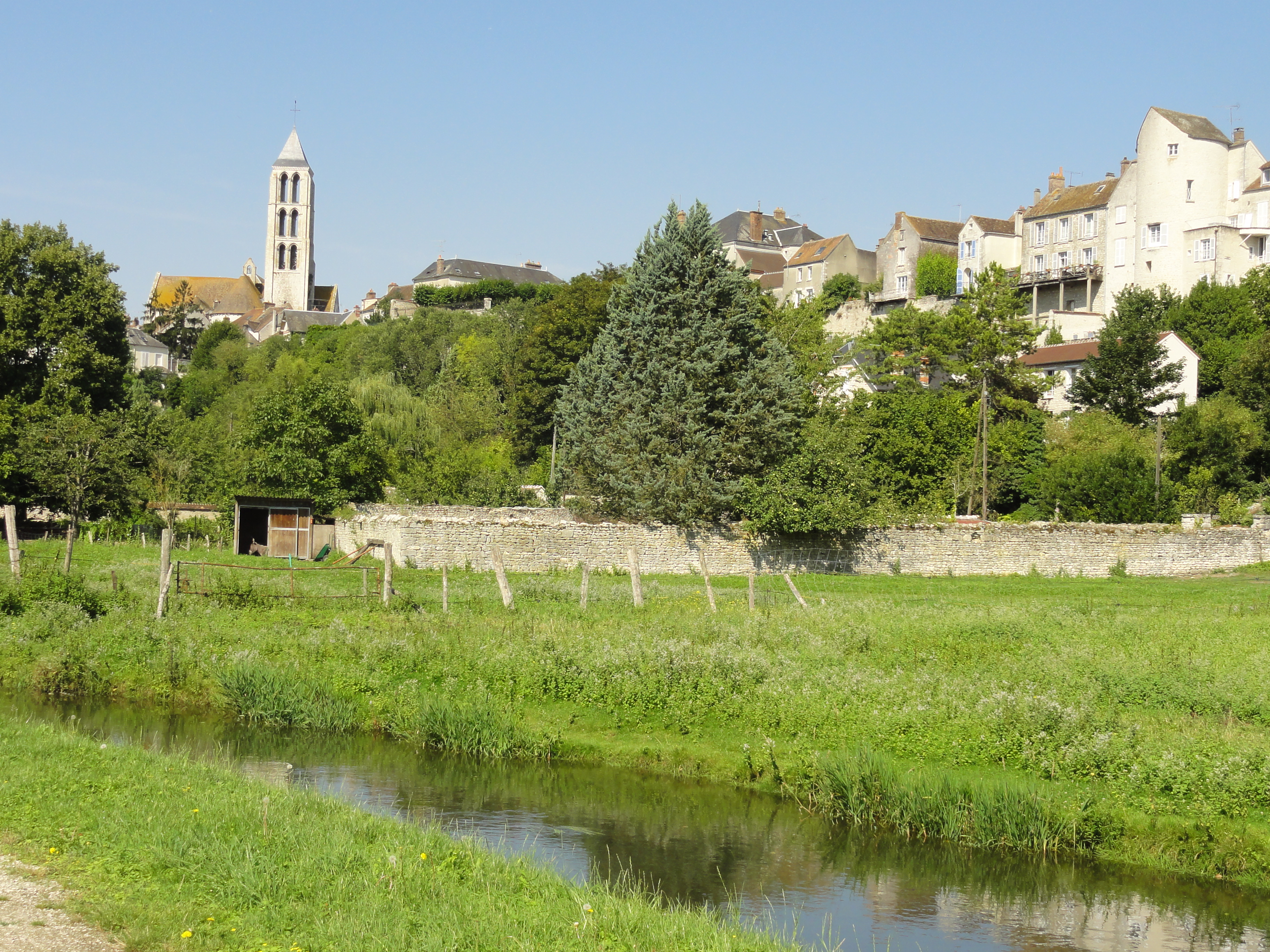 Panorama depuis la vallée du Fusain, avec le clocher de l'église Notre-Dame.